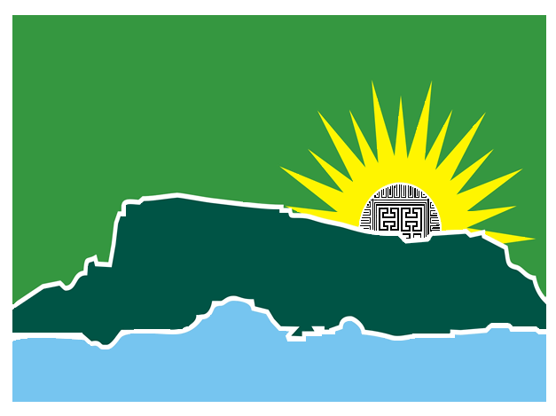 Bandera del municipio Sucre, estado Falcón, Venezuela